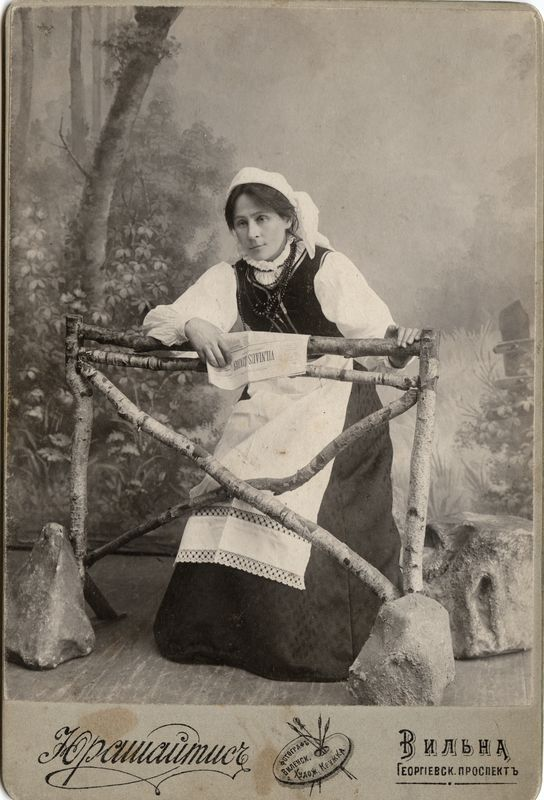 Writer Sofija Ivanauskaitė Pšibiliauskienė – Lazdynų Pelėda